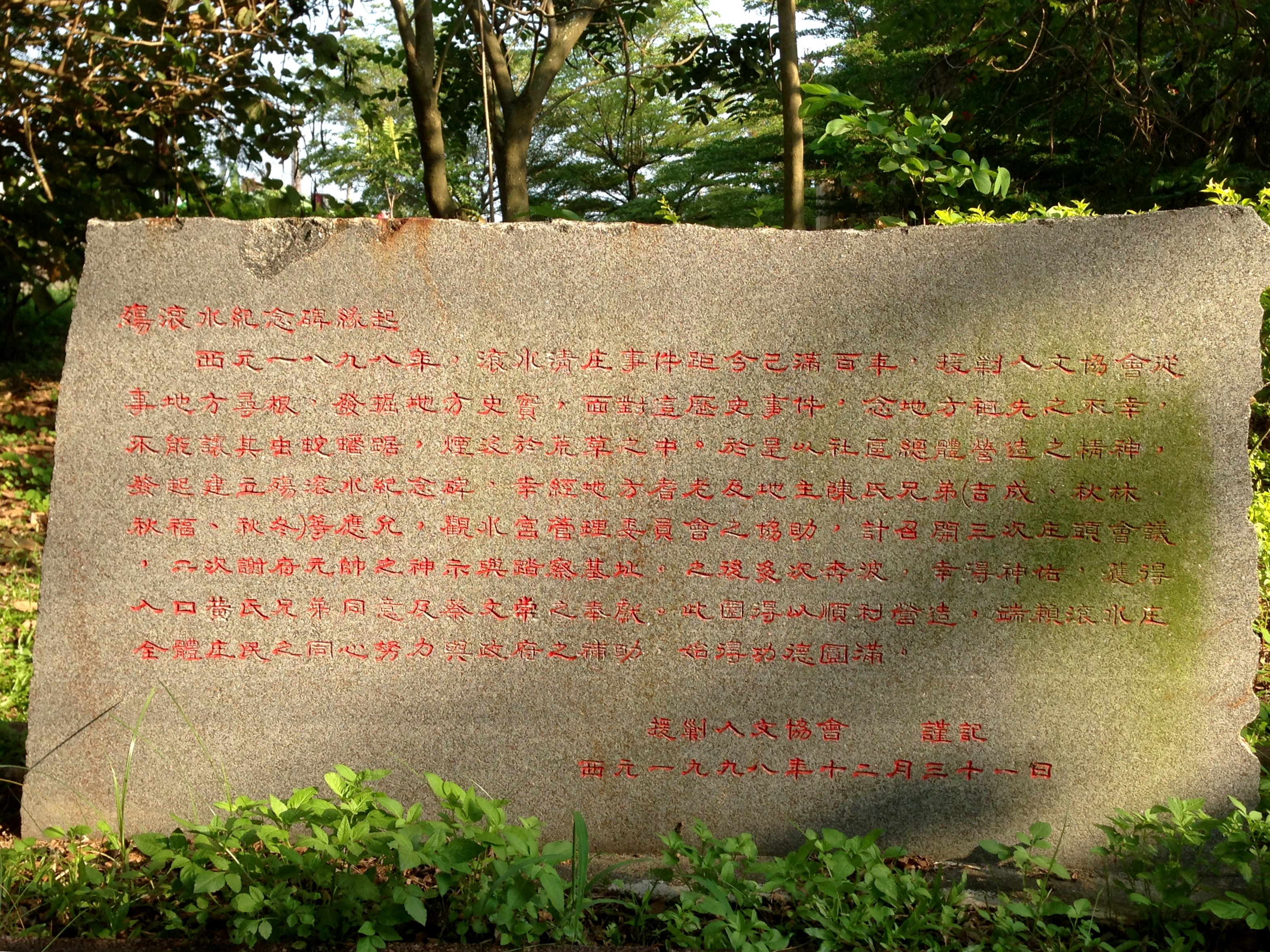 中文（台灣）: 殤滾水紀念碑文